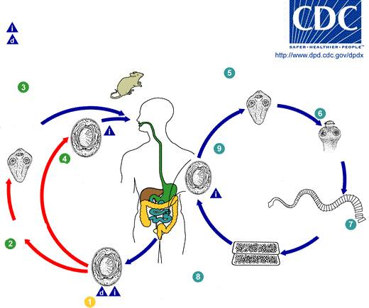 Redigerad bild från wikimedia commons